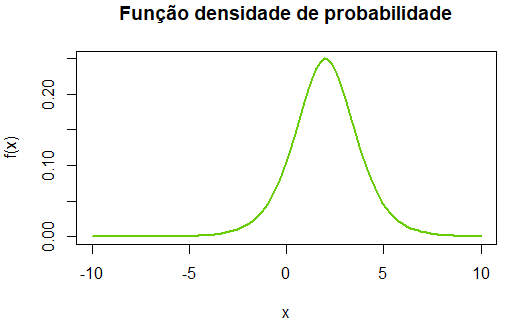 Gráfico da função densidade de probabilidade da distribuição Logística